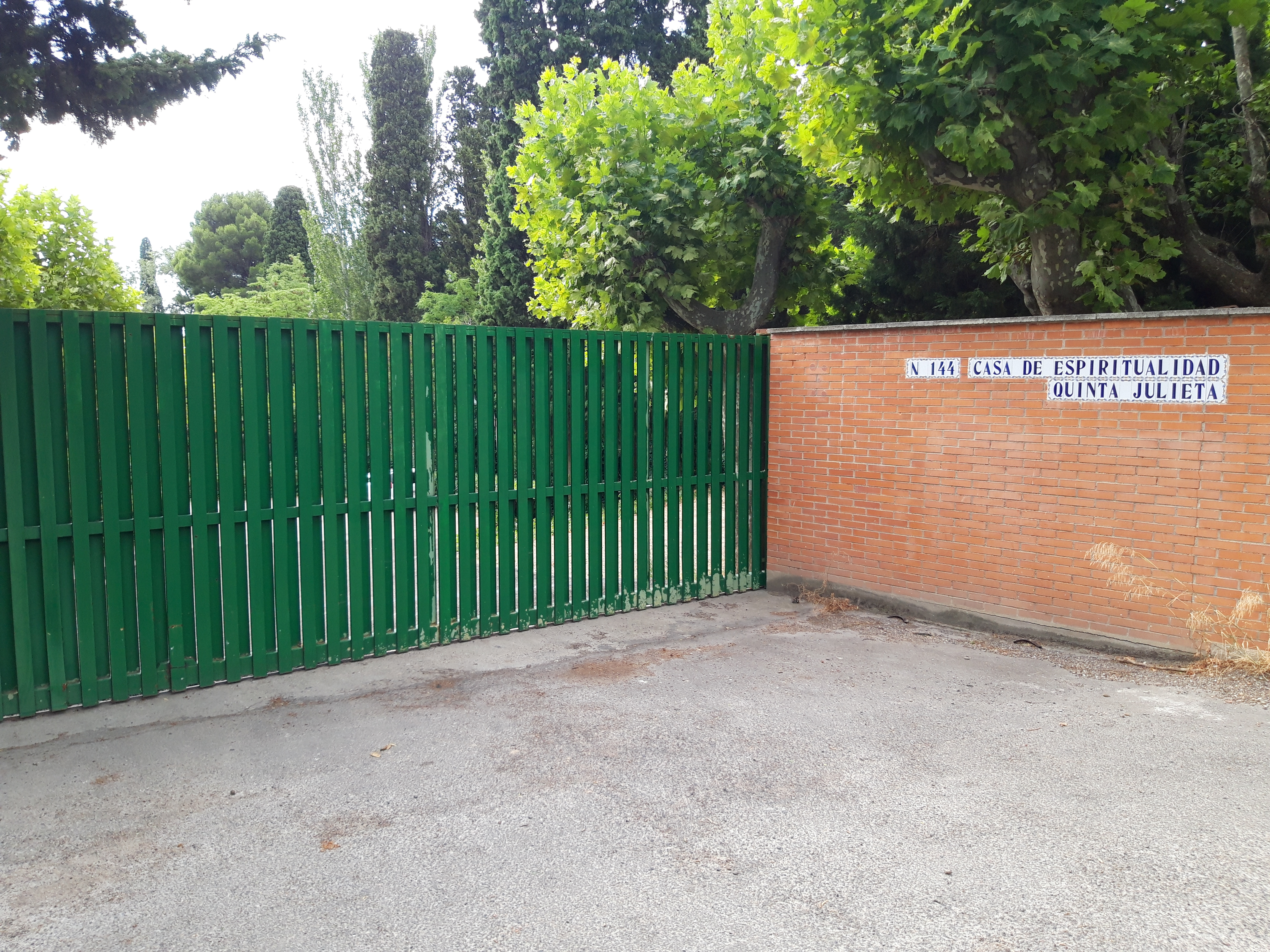 Aragonés: Quinta Julieta Zaragoza